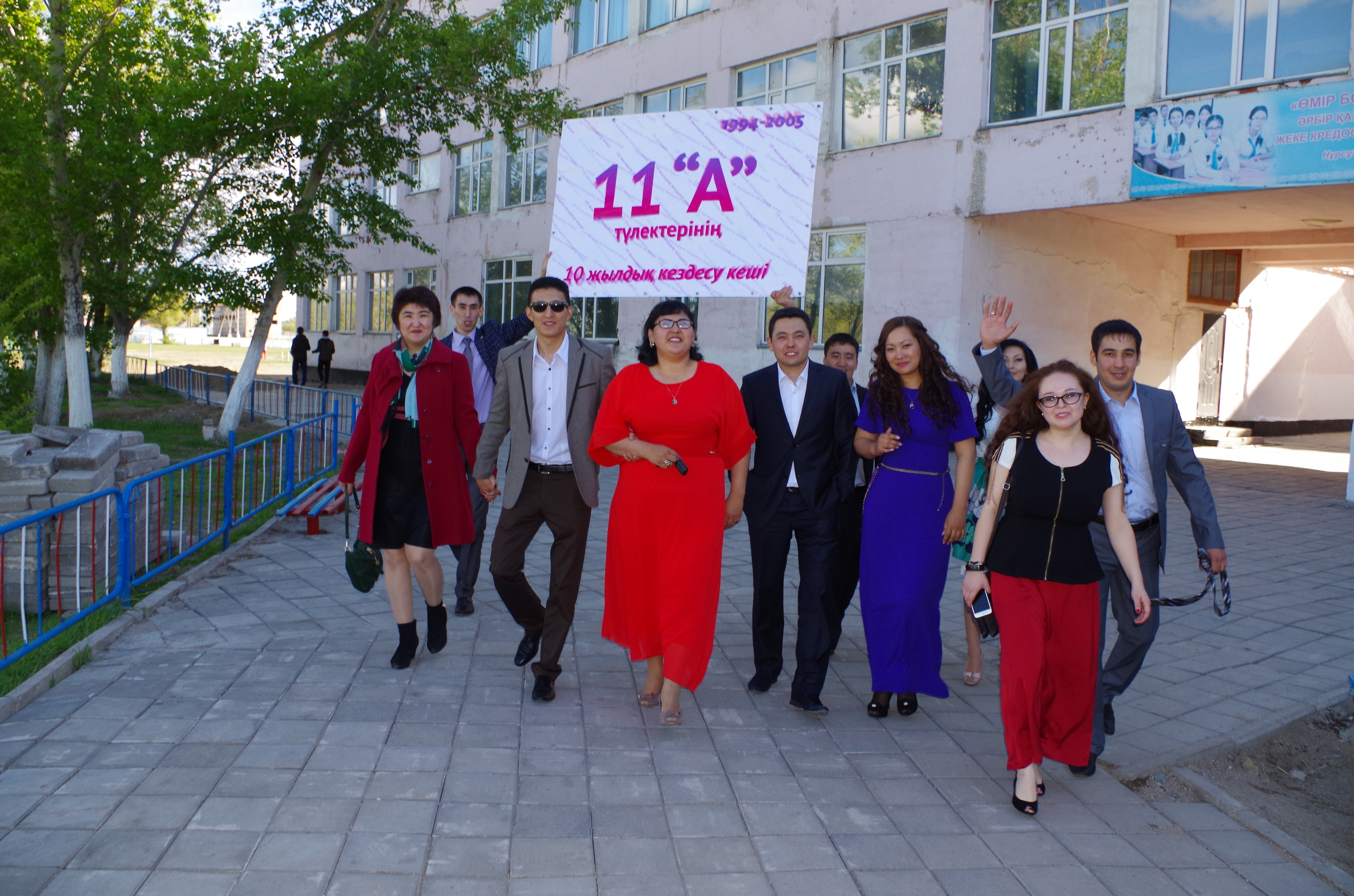 Выпускники 2005 года отмечают 10 лет окончания школы